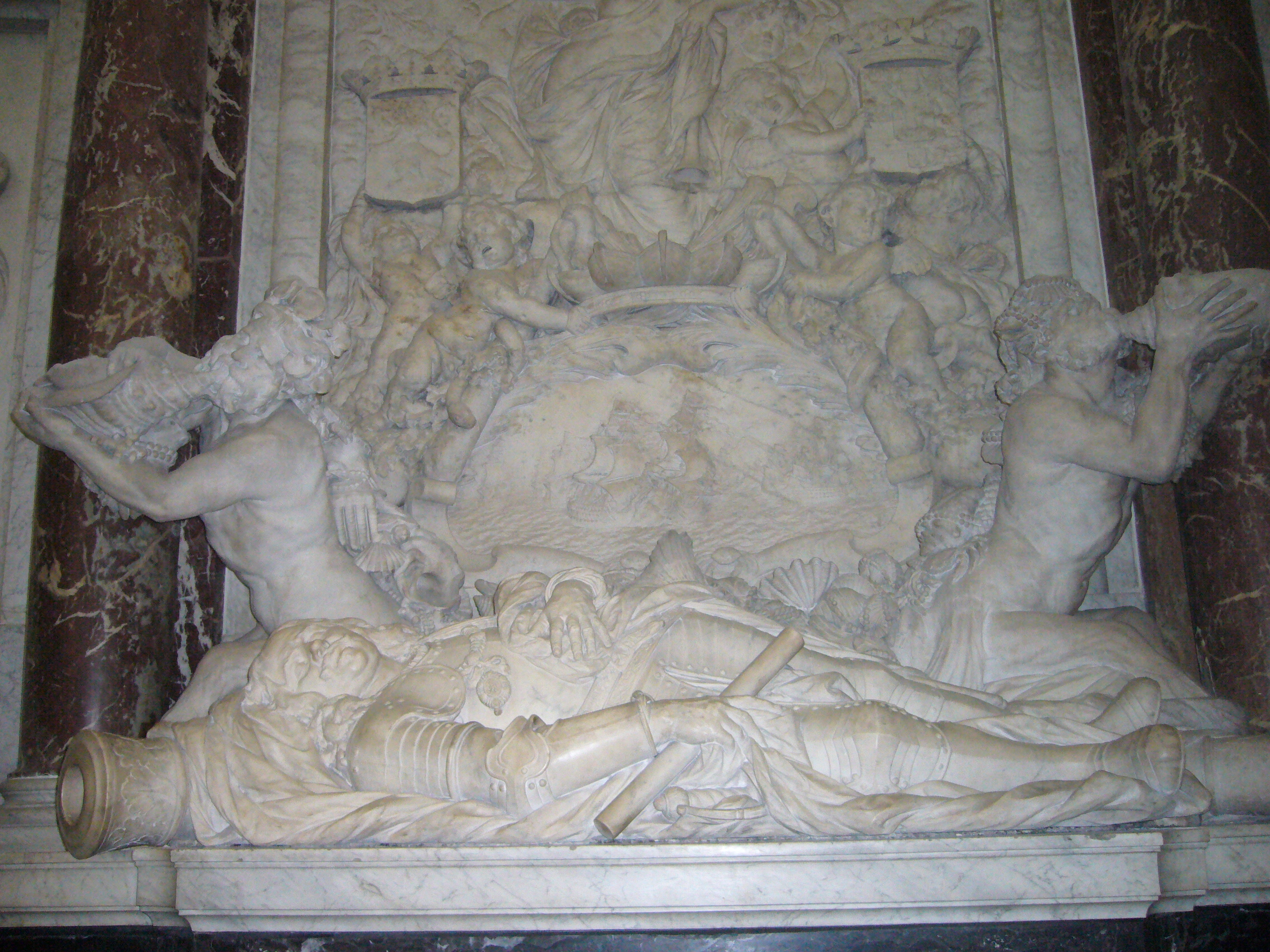 Praalgraf van Michielde Ruyter, in de Nieuwe Kerk in Amsterdam (Sculptor: Rombout Verhulst)